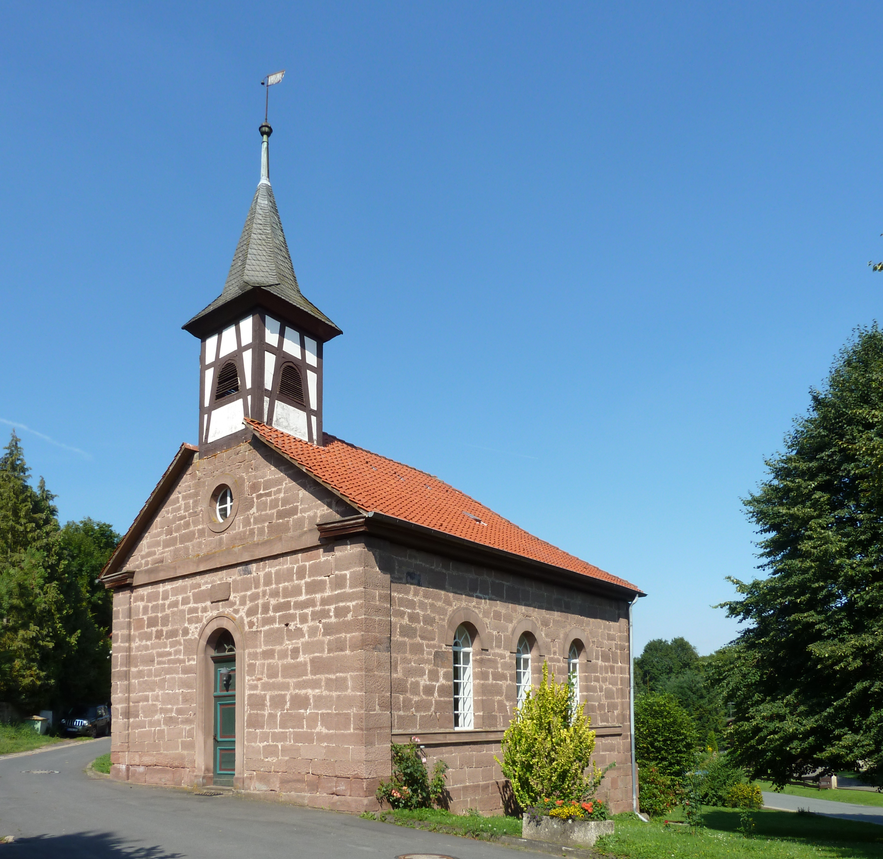 Evangelische Kirche in Ischenrode, Gemeinde Gleichen, Landkreis Göttingen. Erbaut 1845/46 als Saalbau aus Sandstein-Werkstein mit Fachwerk-Giebelreiter.